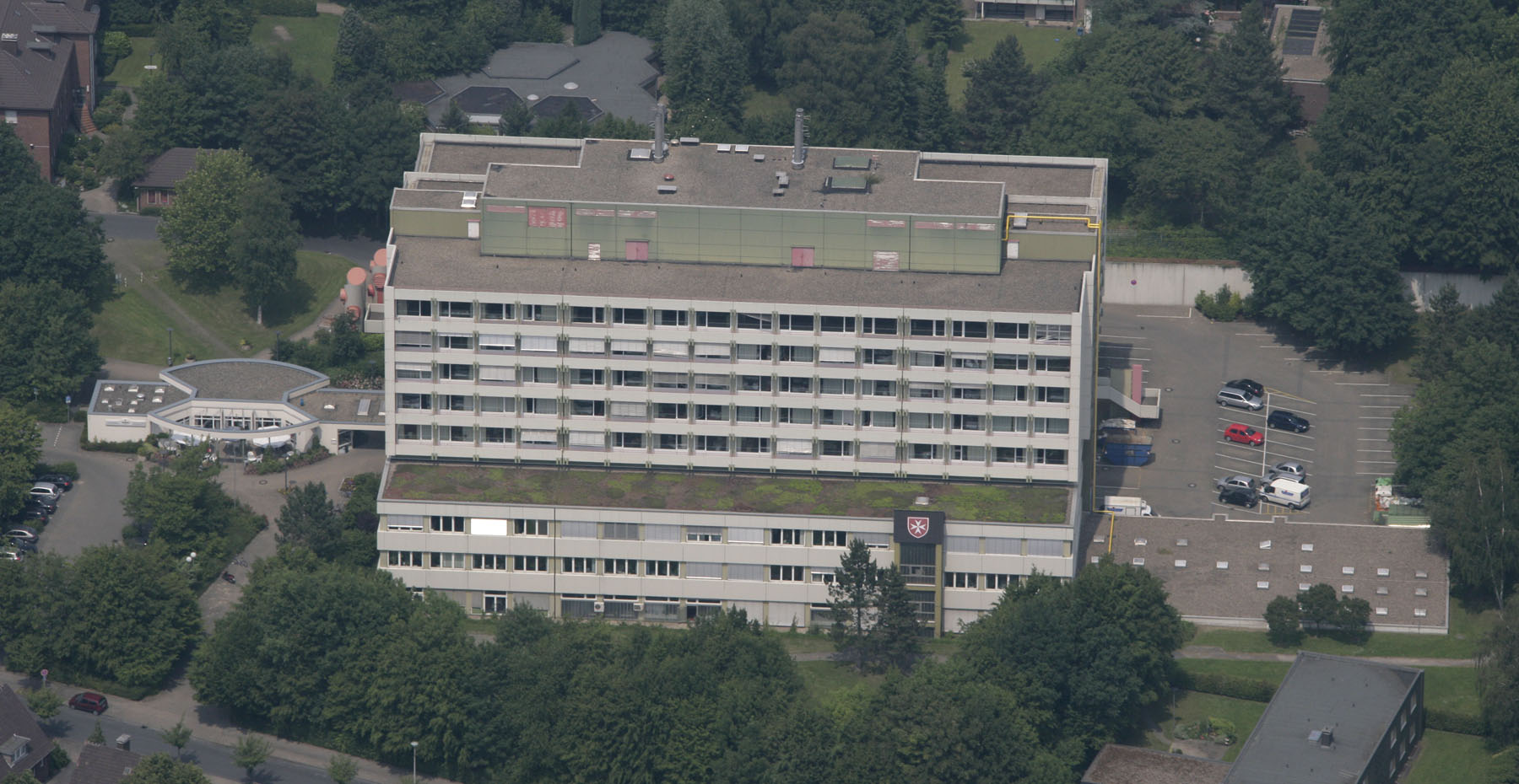 Luftbildaufnahme Hamm